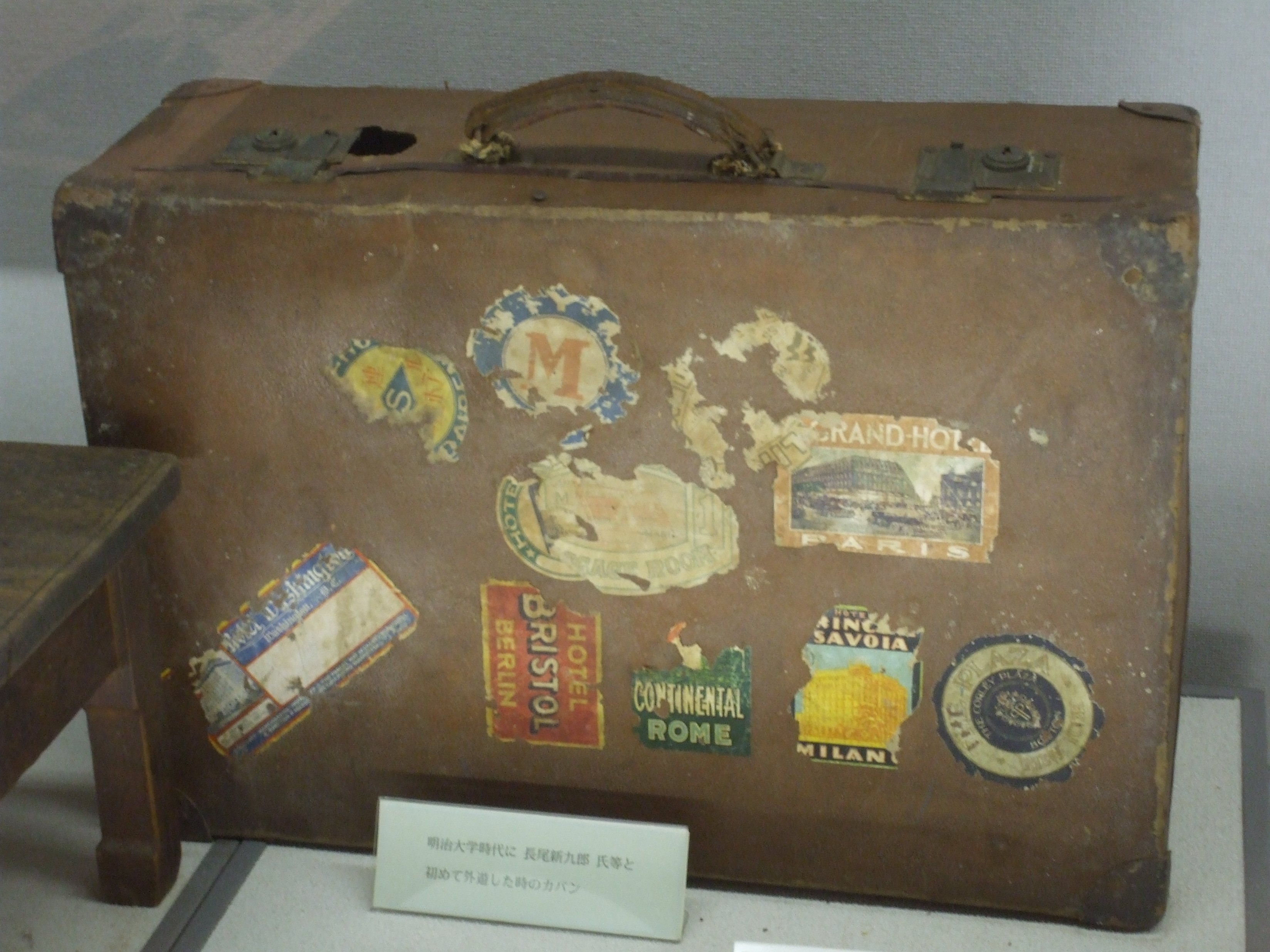 三木武夫がアメリカ、ヨーロッパ各国に遊説、視察旅行をした際に使用したカバン。土成歴史館にて撮影。